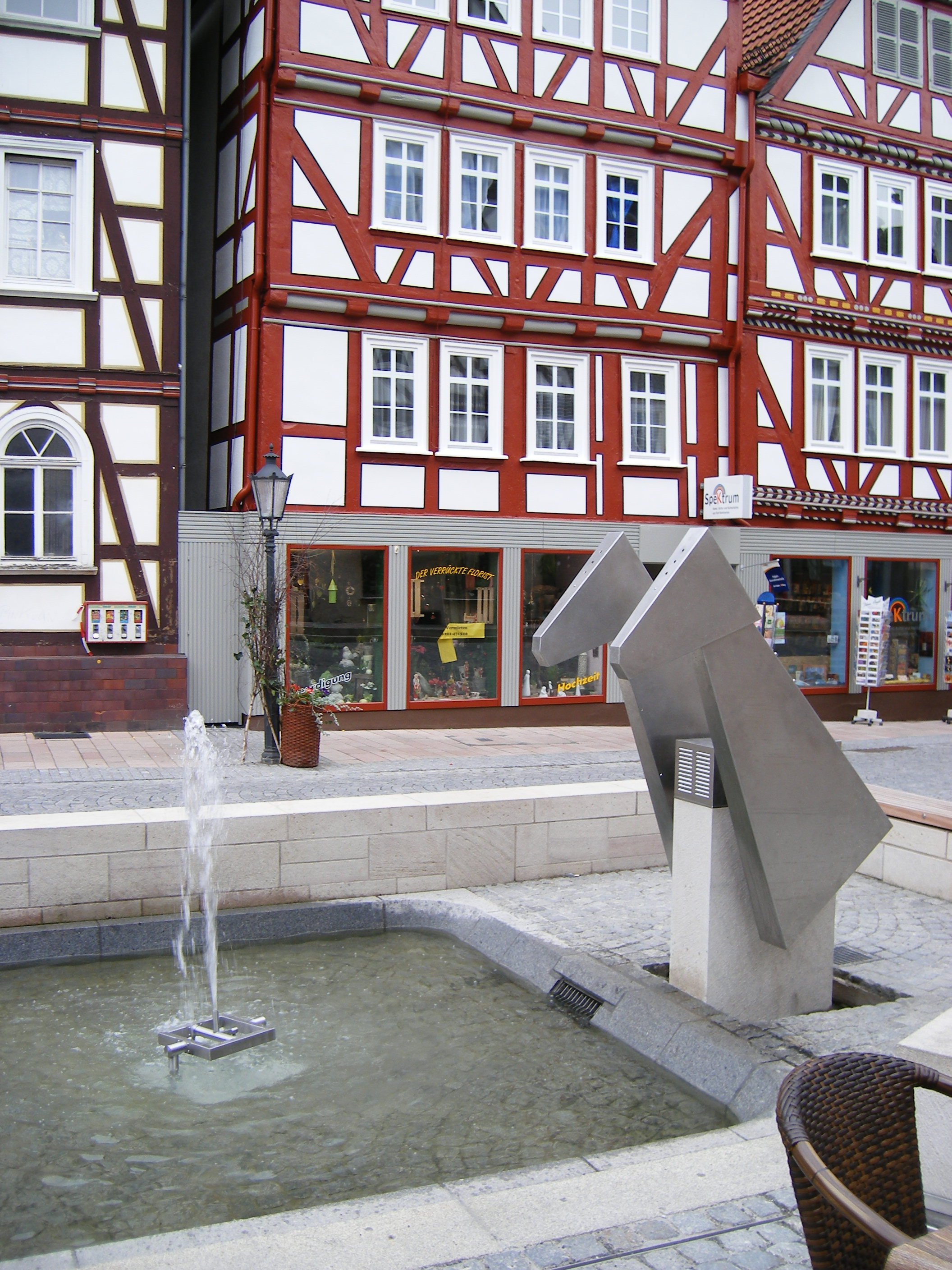 Die Wasserspiele an der Pferdeschwemme in Homberg (Efze)